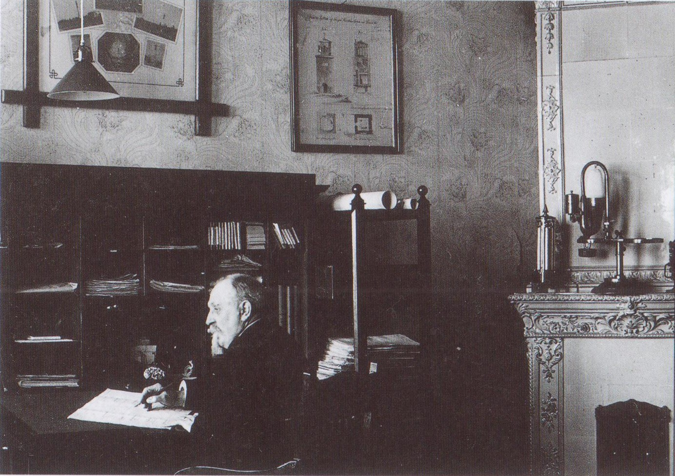 Insinööri Ernst Andersin työhuoneessaan Luotsiylihallituksessa. Kuva on otettu 1900-luvun alussa.